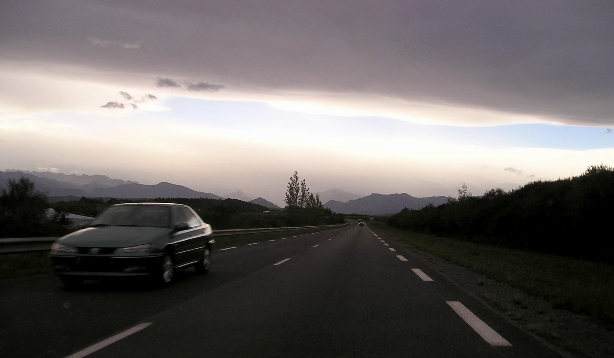 Effet de Foehn